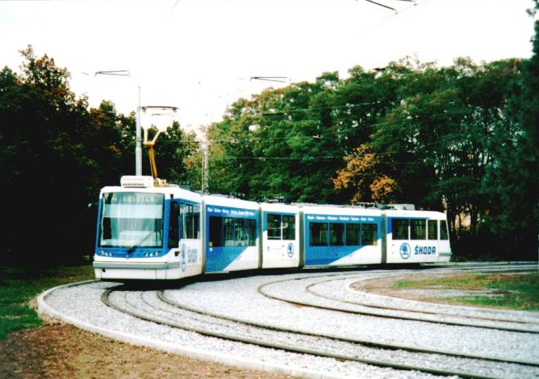 Prototyp tramvaje Škoda 05T v Plzni (Bory)